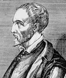 Der italienische Renaissance-Gelehrte Gerolamo Cardano (1501-1576)